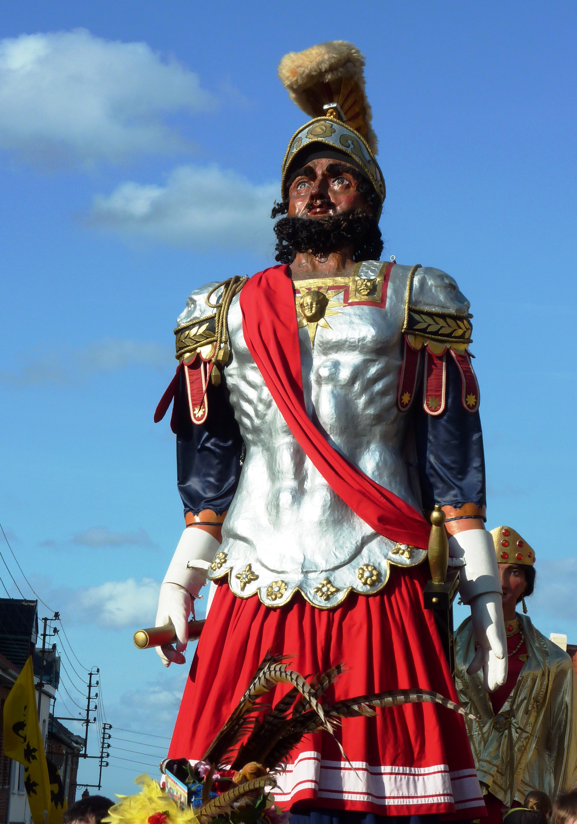 Reuze Papa Géant de Cassel (59) Photo : Josse MARTIN